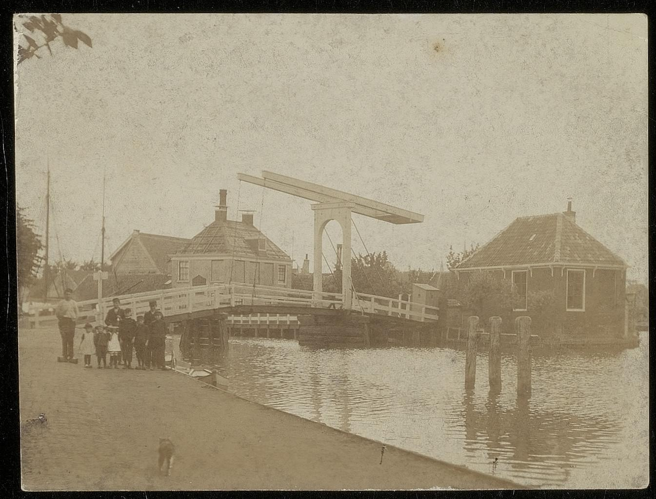 Beschrijving De Tolbrug over de Kostverlorenvaart aan de Baarsjes, gezien in noordoostelijke richting vanaf de Baarsjesweg Documenttype foto Vervaardiger Onbekend Anoniem Collectie Collectie Stadsarchief Amsterdam: foto-afdrukken Datering 1900 ca. Geografische naam Baarsjesweg Kostverlorenvaart Inventarissen Afbeeldingsbestand ANWU00092000001